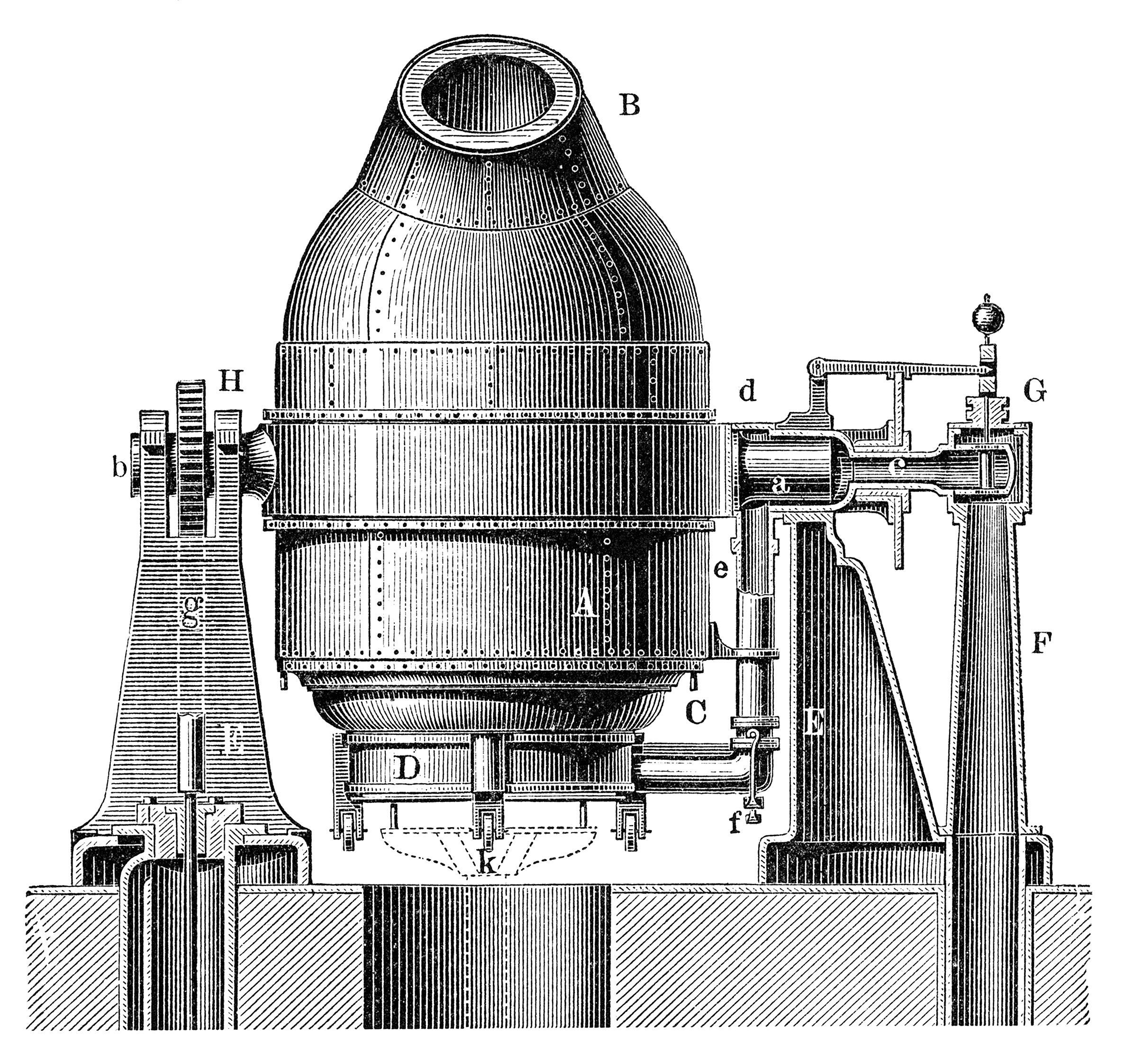 Bessemerbirne Bei dem Bessemerprozeß benutzt man einen Ofen mit beweglicher Birne (Konverter, Retorte). Diese Bessemerbirne A mit Hals B besteht aus Eisenblech und ist mit feuerfesten Ziegeln ausgekleidet. Diese Ziegel werden für den sauren Prozeß aus Quarzit, Tonstein und geringen Mengen feuerfesten Tons hergestellt und gebrannt. Für den basischen Prozeß bereitet man Steine aus gebranntem und gemahlenem Dolomit mit entwässertem Teer, indem man die Masse in hydraulischen Pressen einem starken Druck aussetzt. Bisweilen werden die Steine auch in eisernen Formen gestampft und dann geglüht. Das Bodenstück C ist entweder an dem Hauptkörper A fest angenietet, oder kann davon abgenommen werden, um voll feuerfesten Materials gestampft zu werden, in dem man konische Öffnungen zur Aufnahme von sieben Tonformen laut, deren jede wieder 7–13 zylindrische Kanäle (Düsen) von 9–12 mm Durchmesser zur Windzuführung hat. Mittels eines hydraulischen Kolbens k wird der auf Rollen laufende Windkasten D unter dem Moden der Birne angedrückt.